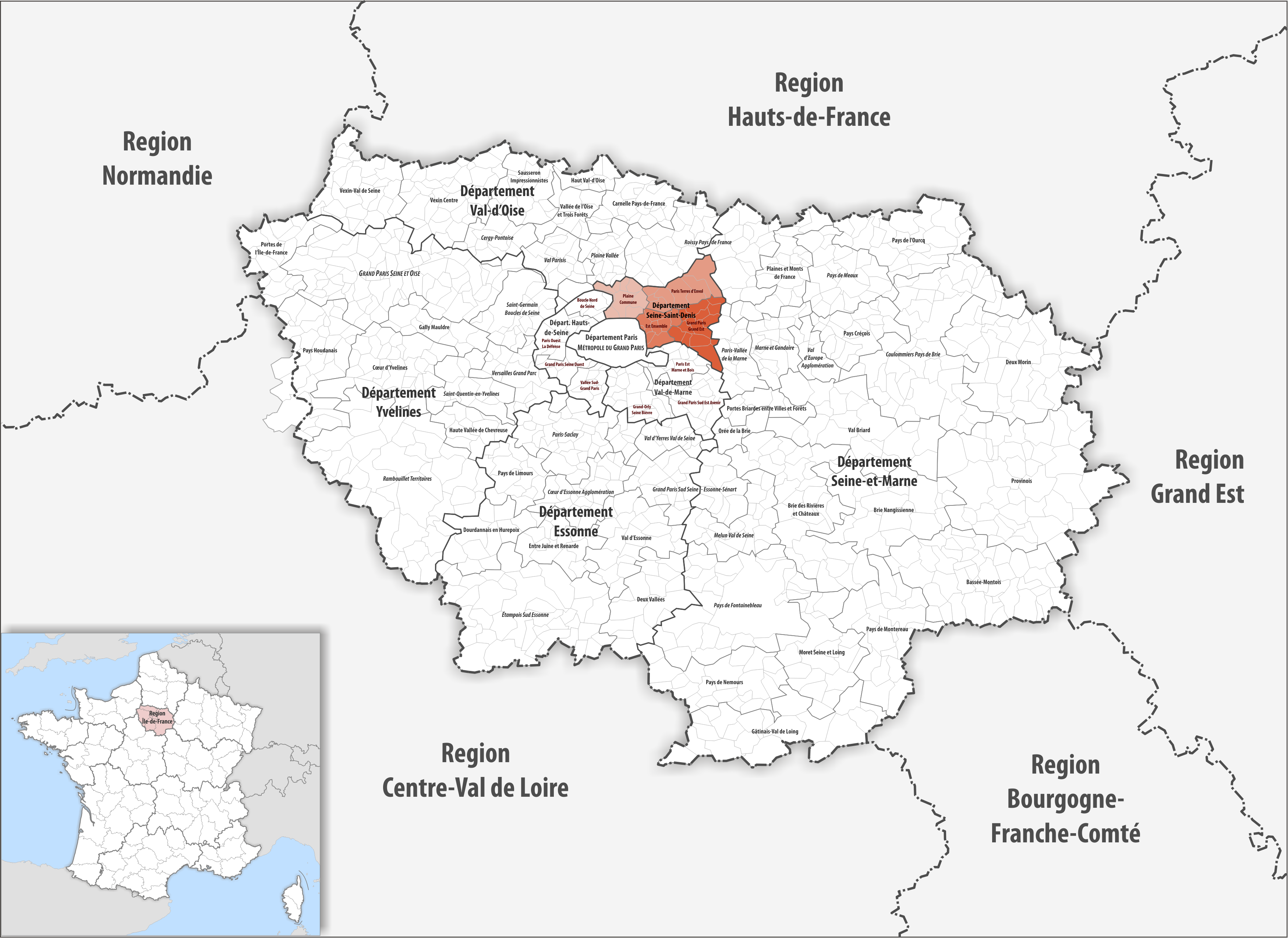 Gemeindeverbände im Département Seine-Saint-Denis